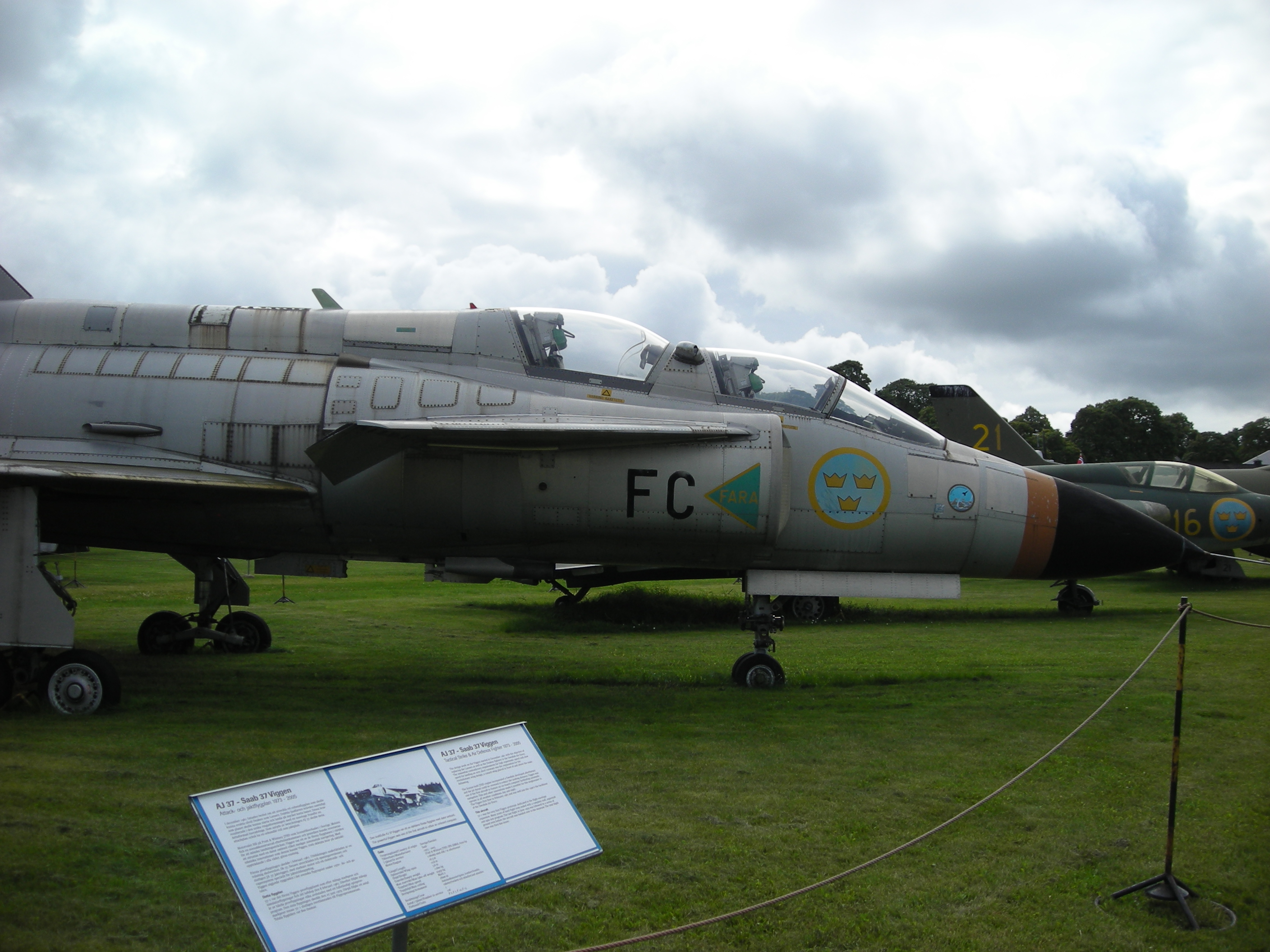 SK 37 Viggen, här utställd på Flygvapenmuseum i Linköping. Flygplanstypen levererades som SK 37 till Flygvapnet år 1976, och har tjänstgjort som utbildningsflygplan under olika perioder vid F 4, F 7, F 15, F 16 och F 21. Under åren 1997-2000 modifierades en grupp om tio flygplan till SK 37E Viggen, i syfte att ersätta J 32E som störflygplan. Just denna individ är inte modifierad. Flygplanstypen togs officiellt ur tjänst år 2005.